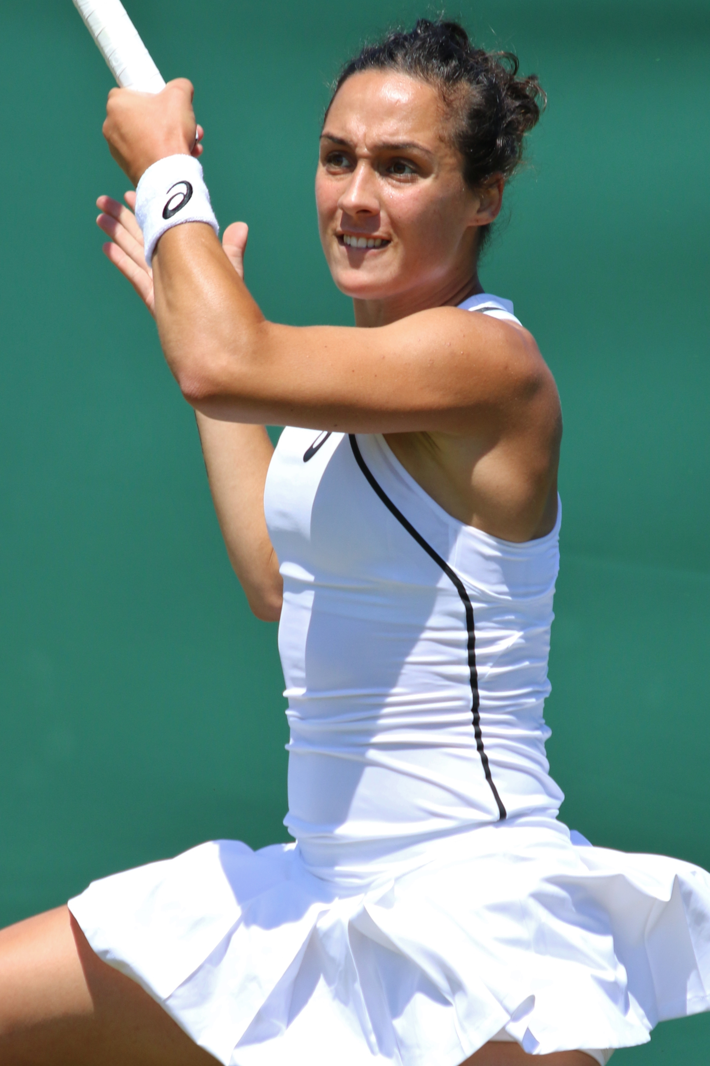 Trevisan WMQ18 (28)